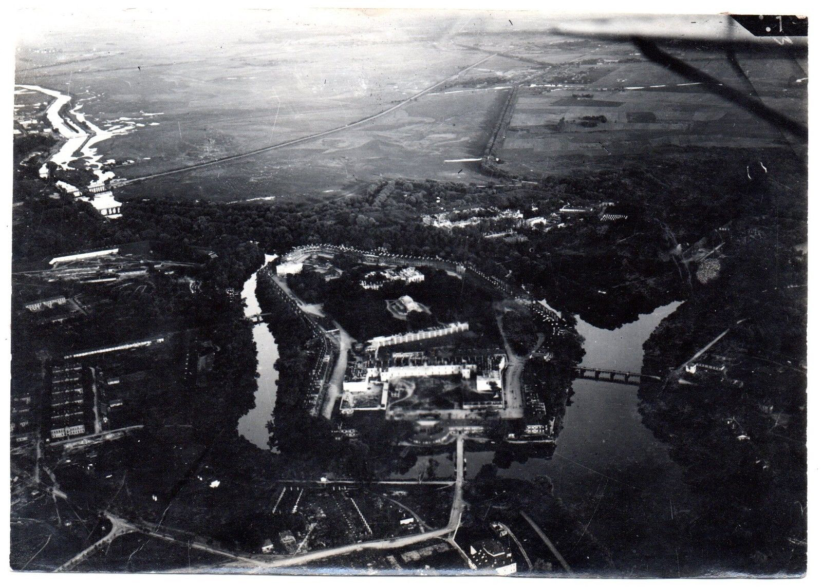 Беларуская (тарашкевіца): Берасьце (Bieraście). Аэрафотаздымак фартэцыі